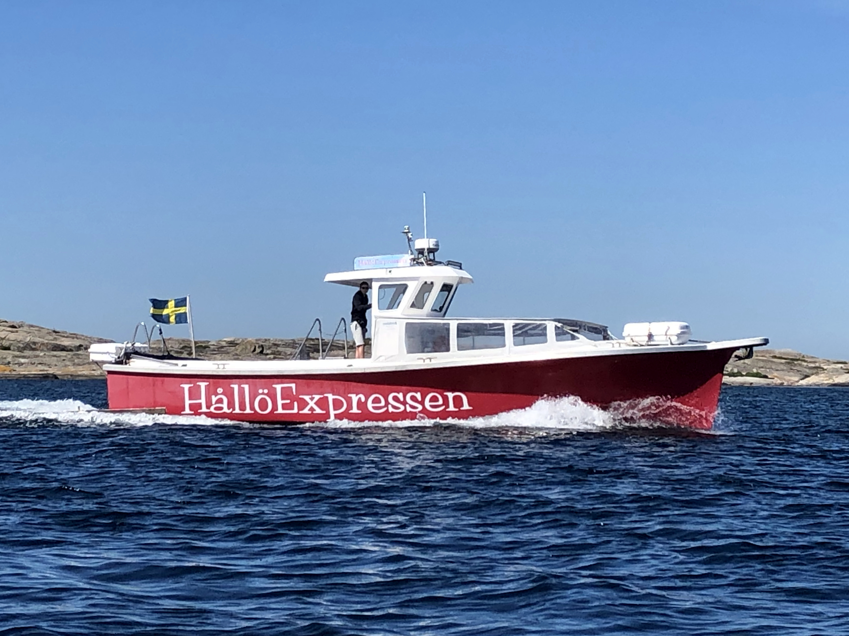 HållöExpressen utanför Hållö, juli 2019. HållöExpressen trafikerar sträckan Kungshamn-Hållö.